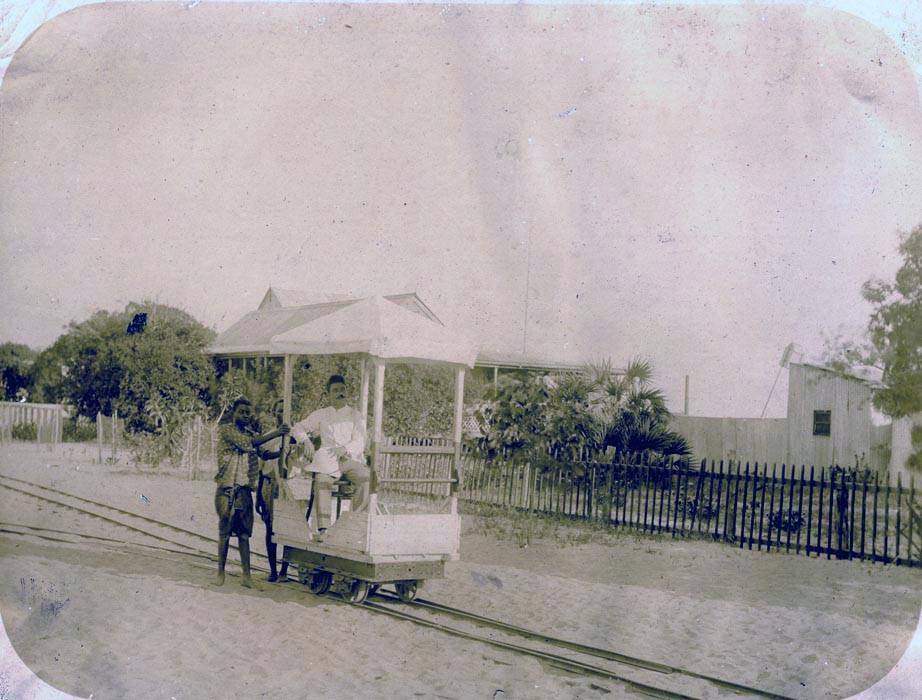 Carro para transporte de pessoas